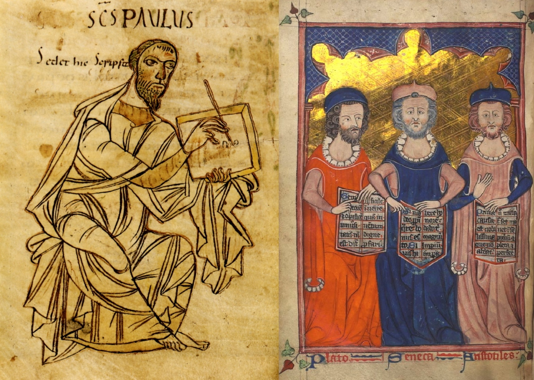 Zusammenfügung zweier mittelalterlicher Zeichnungen: Der Apostel Paulus beim Schreiben, frühes 9. Jahrhundert (Handschrift aus dem Kloster St. Gallen), und Plato, Seneca, Aristoteles in einer Illustration eines mittelalterlichen Manuskripts mit verschiedenen philosophischen Texte.